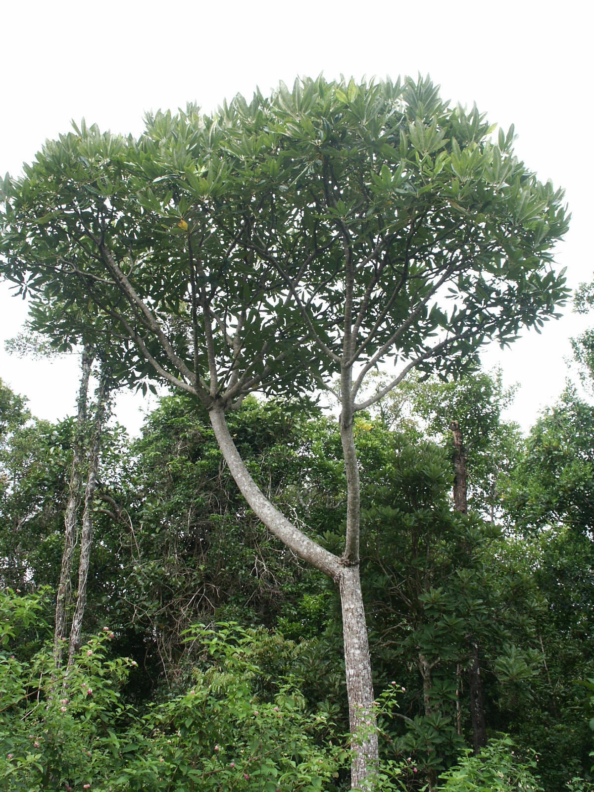 Cerberiopsis candelabra - Candélabre - Spécimen aux environs du Col d'Amieu - Nouvelle Calédonie - Province Sud